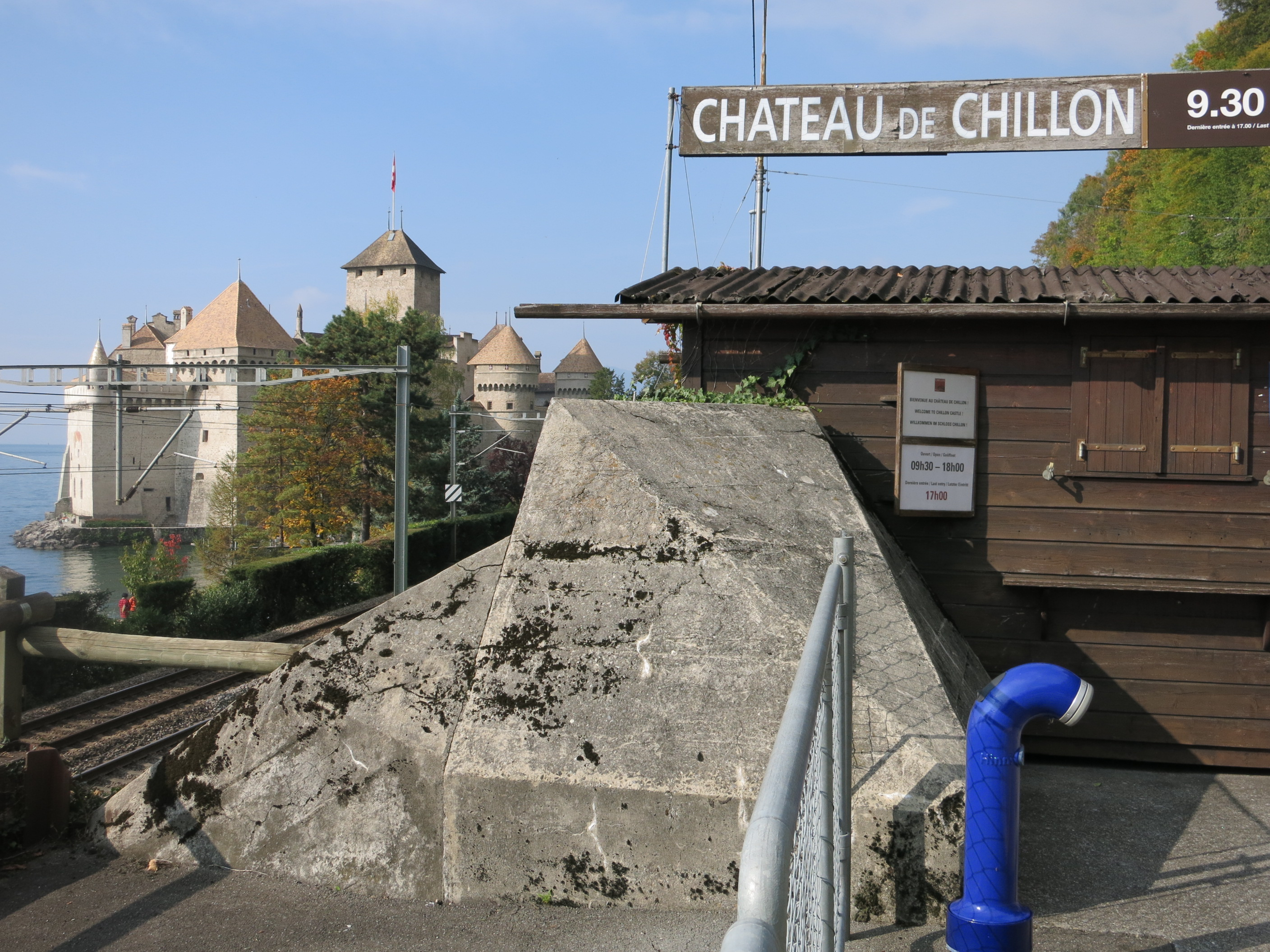 Sperrstelle Chillon VD, Schweiz